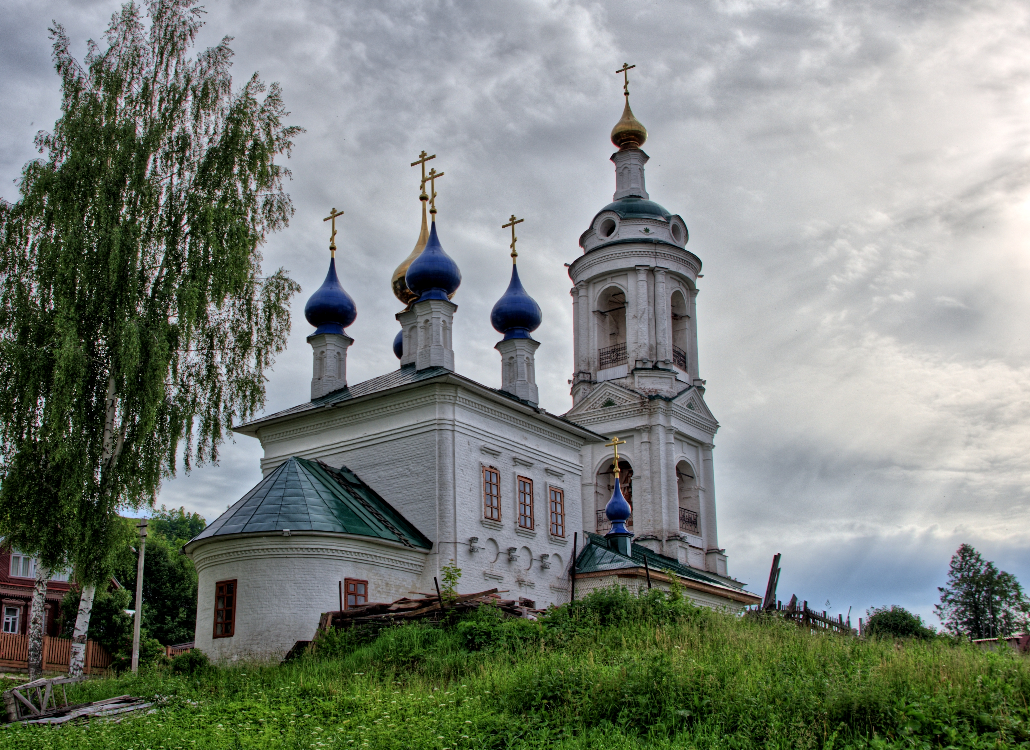 Barbara-Kirche in Pljos.